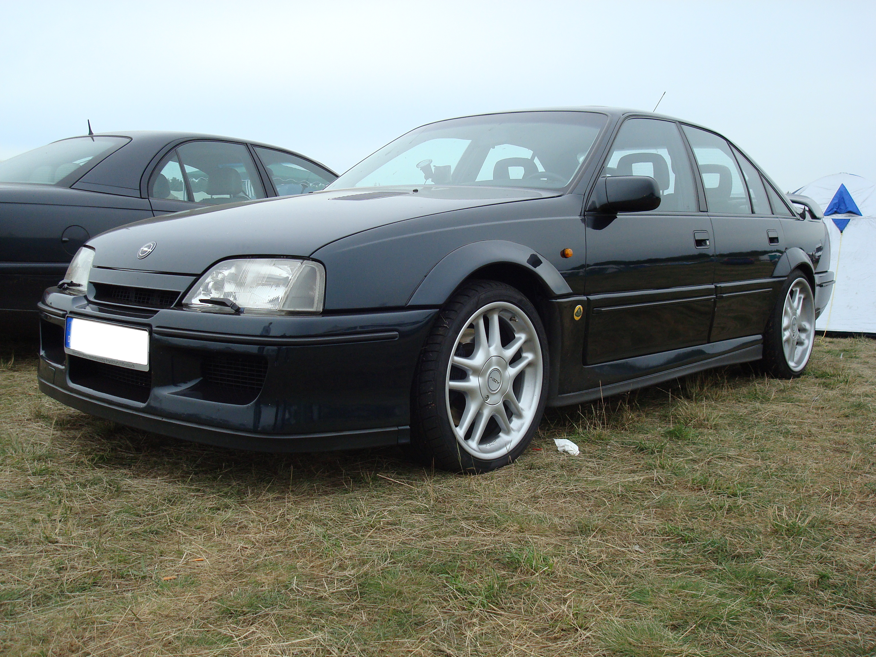 Seite des Lotus Omega